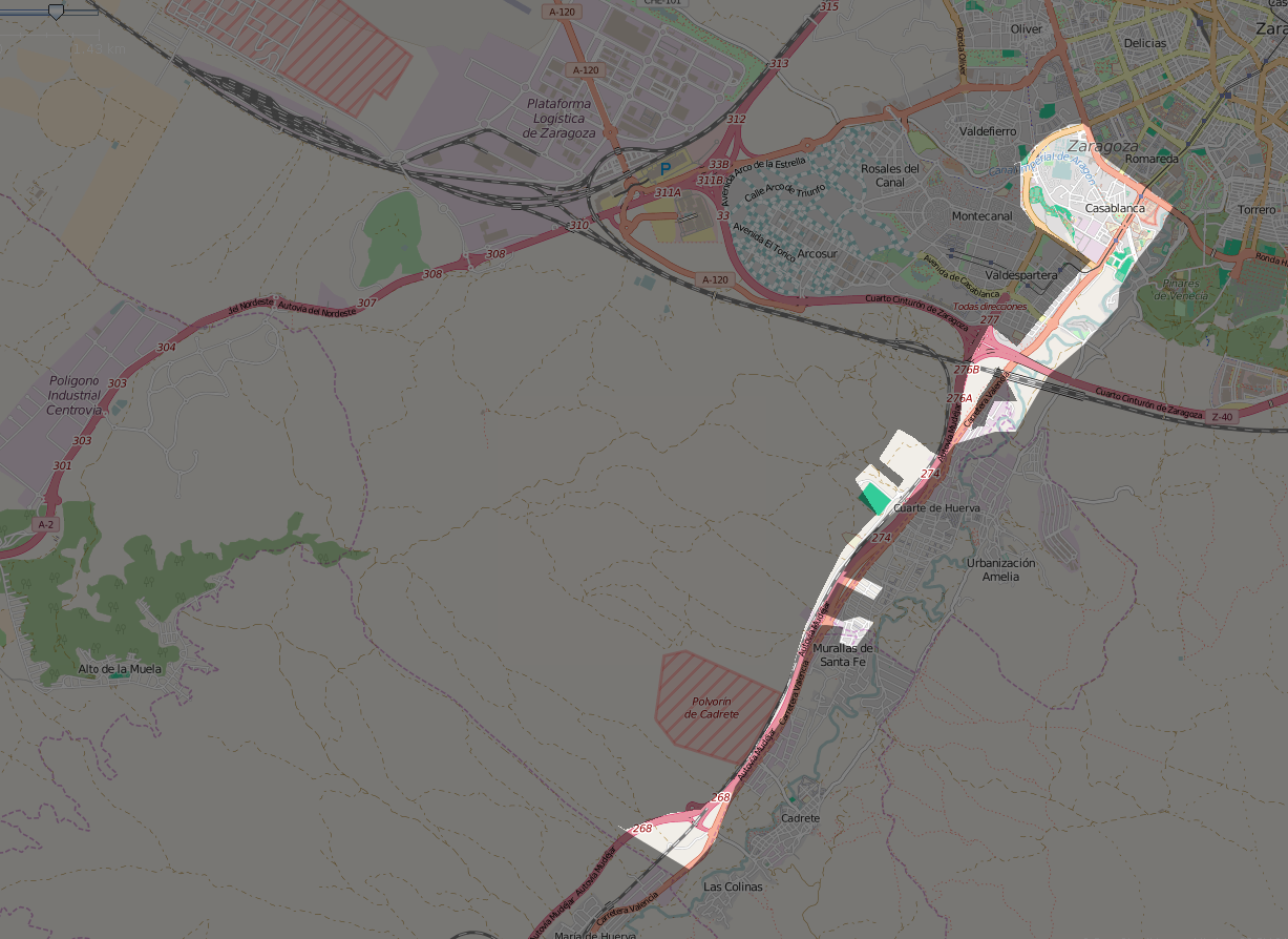 Mapa del distrito de Casablanca en Zaragoza.